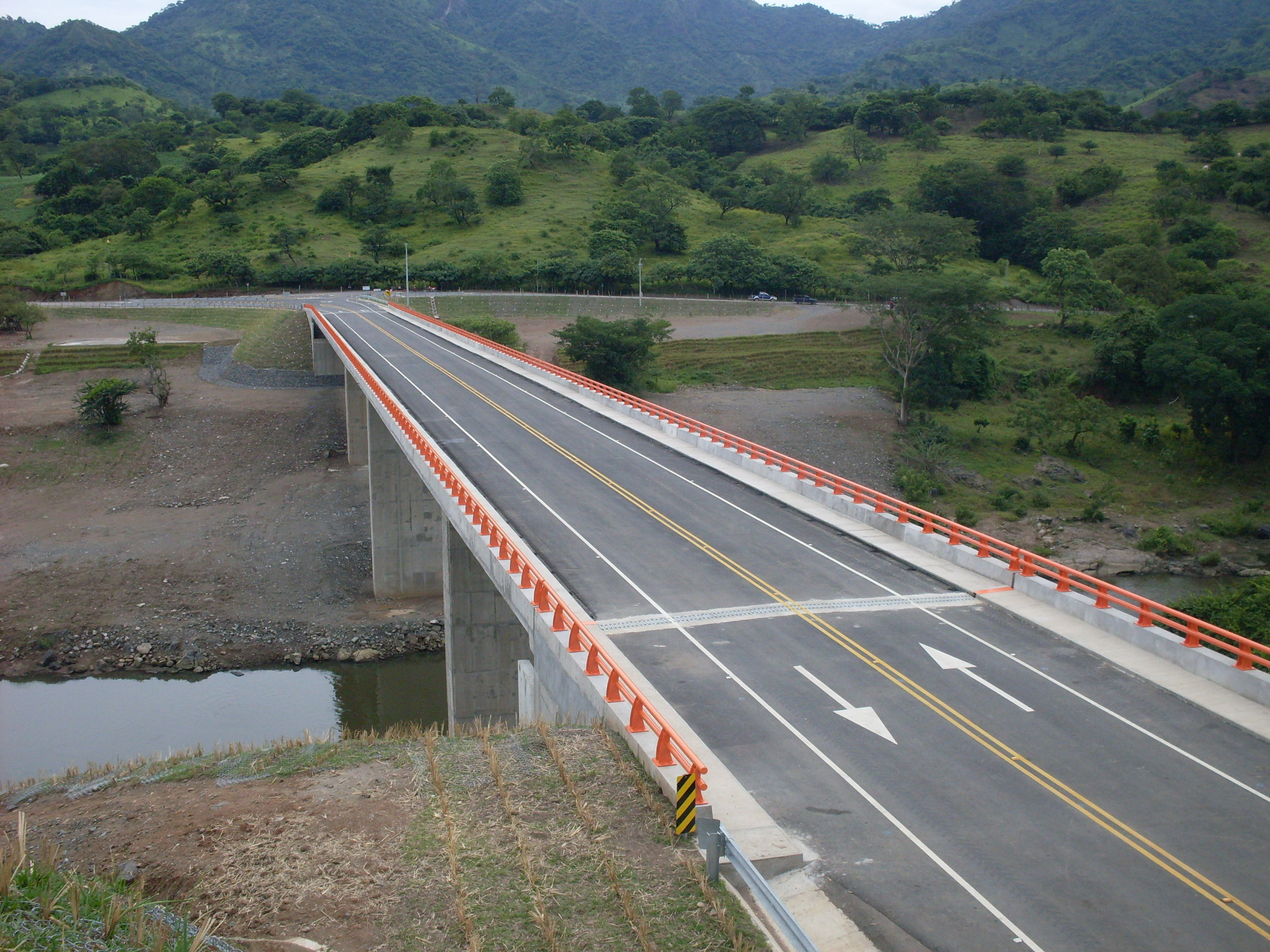 Puente Nombre de Jesús